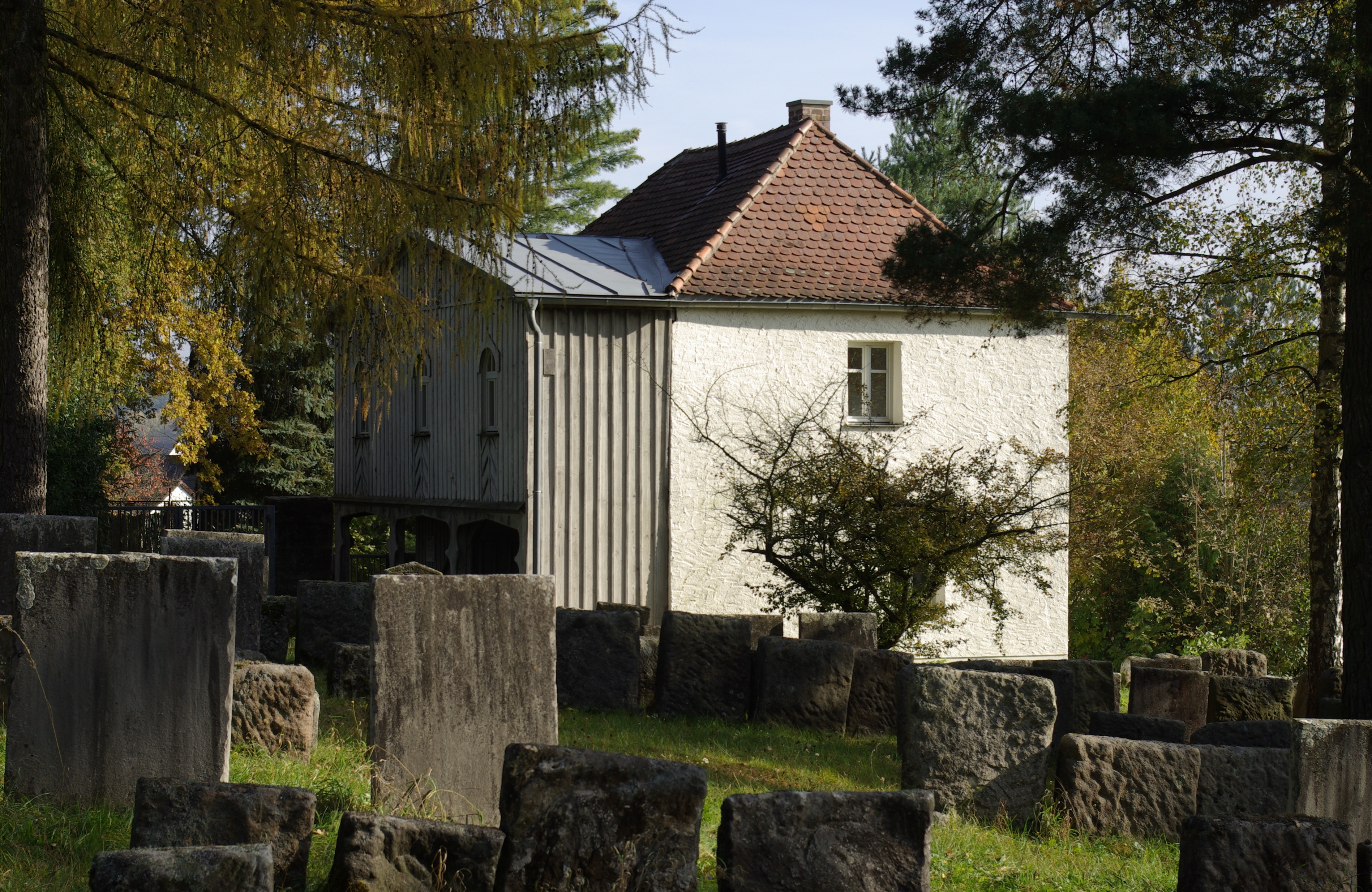 Jüdischer Friedhof in Georgensgmünd